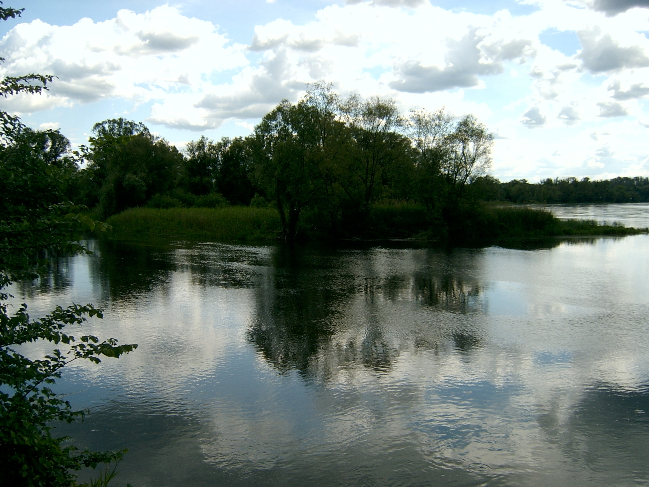 Zusammenfluss der Ilanka (Eilang) mit der Oder bei Świecko.